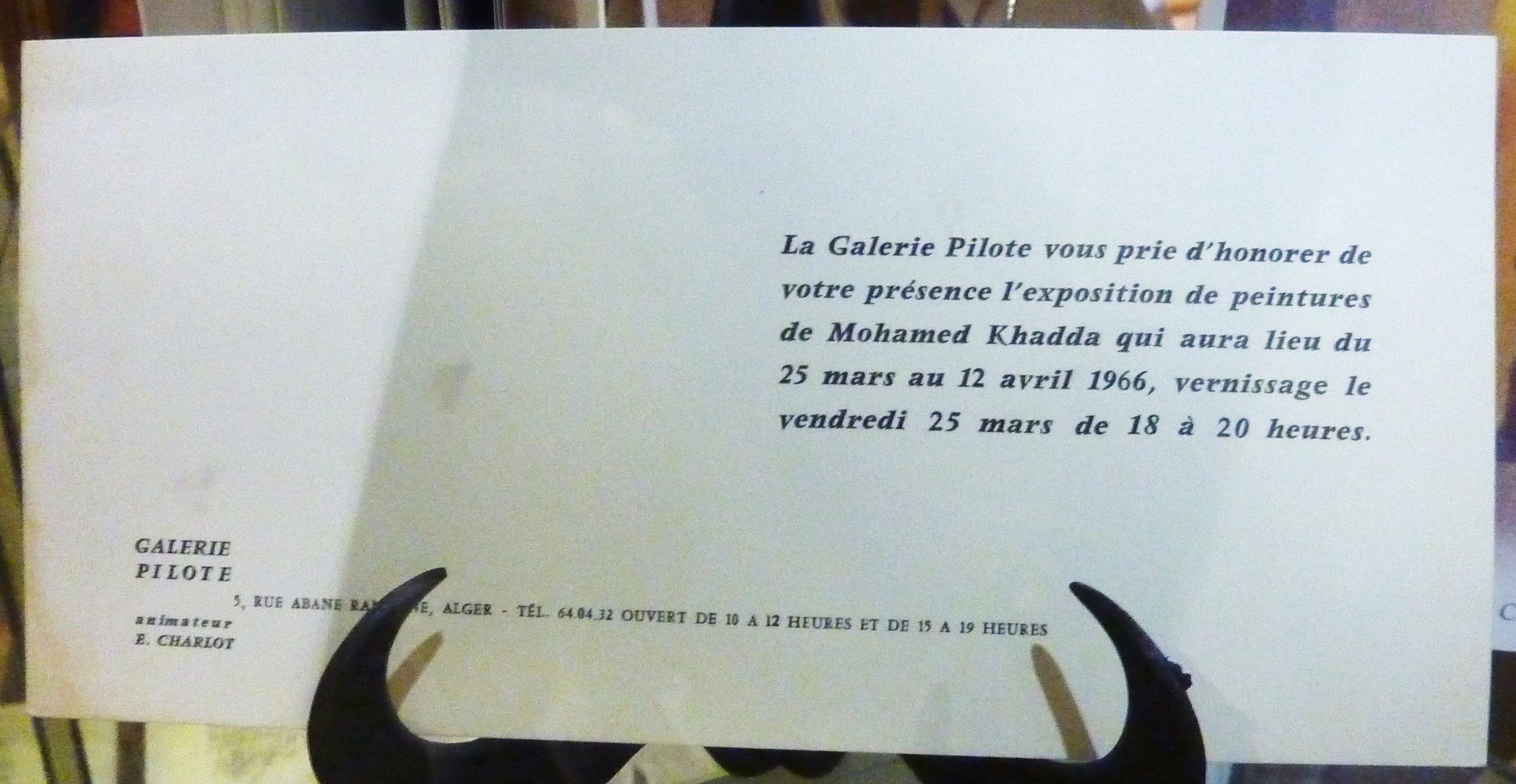 Invitation pour l'exposition du peintre algérien Mohammed Khadda à Alger présentée à la galerie Pilote animée par Edmond Charlot. Document figurant à l'exposition organisée en 2015 par le musée de Pézenas en hommage à Edmond Charlot.